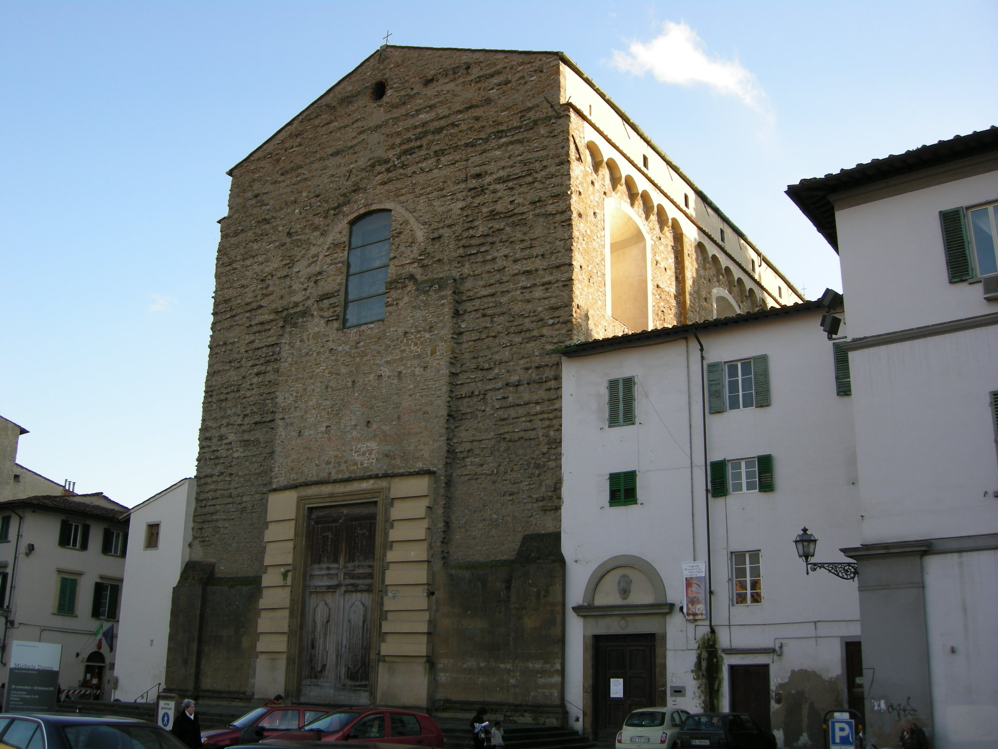 Chiesa del carmine, facciata